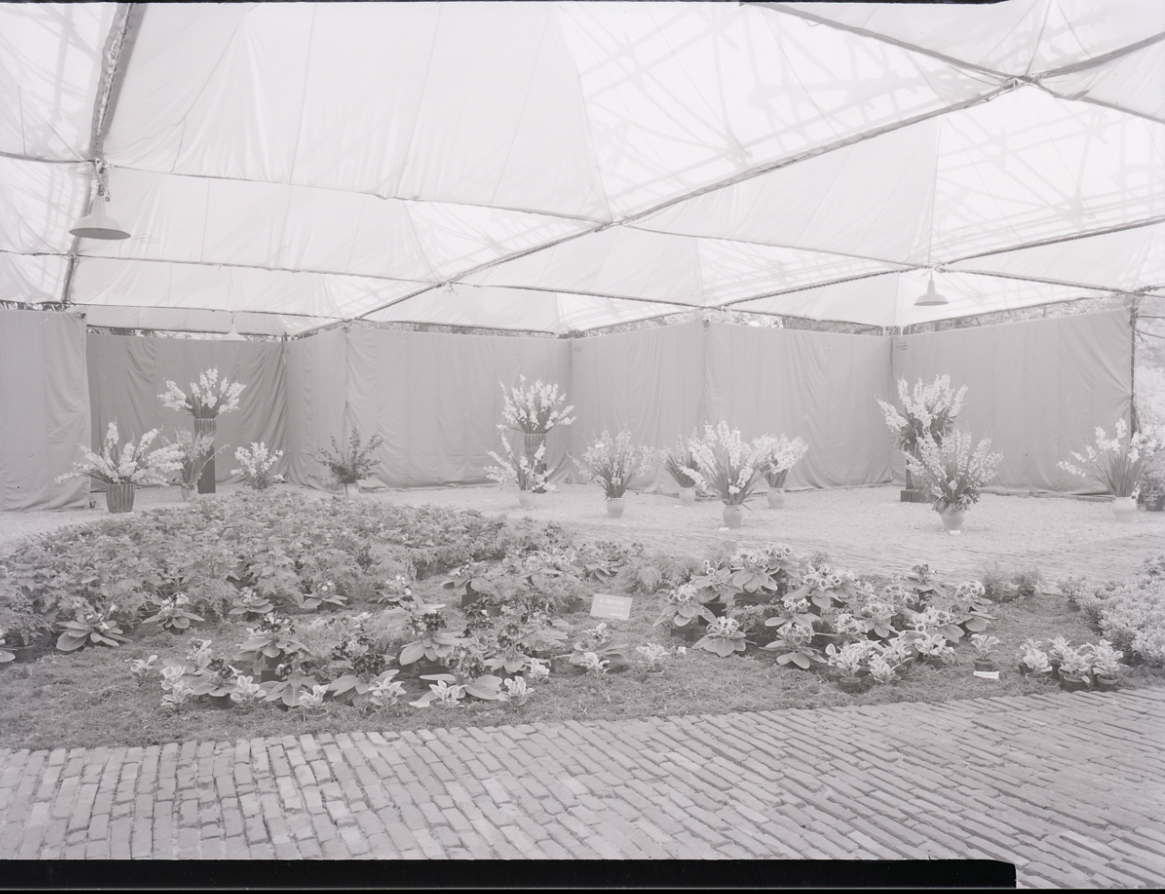 Servizio fotografico : Milano, 1954 / Paolo Monti. - Buste: 15, Fototipi: 15 : Negativo b/n, gelatina bromuro d'argento/ pellicola ; 10x12. - ((Serie costituita da 41 negativi identificati con i nn.: 21267-21281. Sulla busta G21267 manoscritto: "Arch. Terzaghi/ X Triennale/ pad. dei fiori". La suddetta serie è contenuta nella scatola identificata con la numerazione 21154-21281. Sulla scatola manoscritto con pennarello nero: "1/ X Triennale". La scatola è a sua volta contenuta in una scatola grande col coperchio giallo. - Occasione: Documentazione della X Triennale del 1954, intitolata "Prefabbricazione - Industrial Design: Esposizione Internazionale delle Arti Decorative e Industriali Moderne e dell'Architettura Moderna". L'esposizione si tenne presso il Palazzo dell'Arte